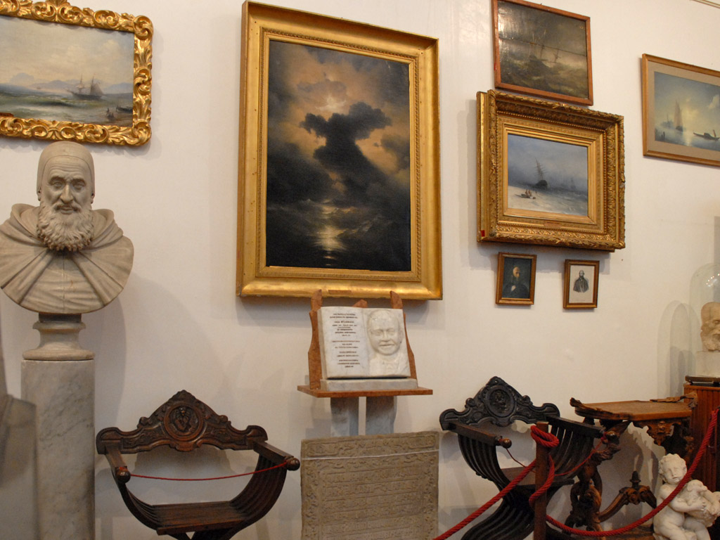 San Lazzaro degli Armeni est une petite île de la lagune de Venise, très proche du Lido. Elle est occupée par un monastère de l'ordre des Mékhitaristes depuis 1717. Le monastère comprend une bibliothèque de 200.000 volumes et manuscrits, un musée, une église, un cloître, des jardins et divers bâtiments. Ordre religieux arménien catholique fondé à Constantinople en 1700, établi en 1703 en Morée (Grèce) alors sous domination vénitienne par l’abbé Mekhitar de Sebaste (auj. Sivas) (1676 Sebaste-1749 Venise). En 1715, les mékhitaristes s’exilent à la suite de la conquête turque et s’établissent à Venise où, en 1717, la République sérénissime leur offre résidence sur l’île de San Lazzaro. De règle bénédictine, Mekhitar s’applique à donner à ses disciples un haut niveau d’éducation, portant une attention particulière au riche héritage culturel arménien. Il développe une intense activité d’édition. La branche autrichienne de l’Ordre reconnue à Trieste en 1773, puis déplacée à Vienne (Autriche) par Napoléon en 1810 est également dotée d’une maison d’édition. En 2000, Venise et Vienne ont fusionné, coïncidant avec le 300e anniversaire de l’Ordre, le 2000e anniversaire du christianisme et le 1700e anniversaire de l’adoption du christianisme par l’Arménie comme religion d’Etat. voir aussi le site sur les diasporas arméniennes